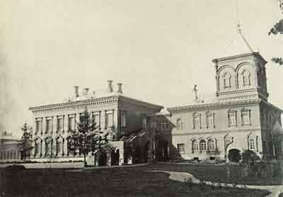 Барятино. Главный усадебный дом. Южный фасад. Фото 1870–1880-х годов. РГАЛИ